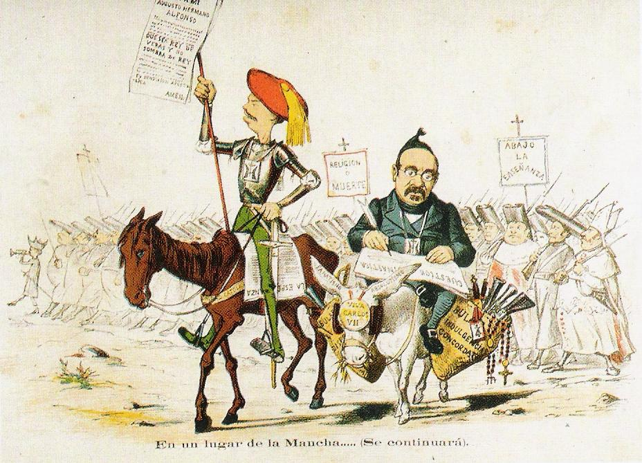 La Flaca agosto de 1869. Caricatura con diversos motivos. La jerarquia eclesiastica aparece como telón de fondo de la crítica caricaturesca.